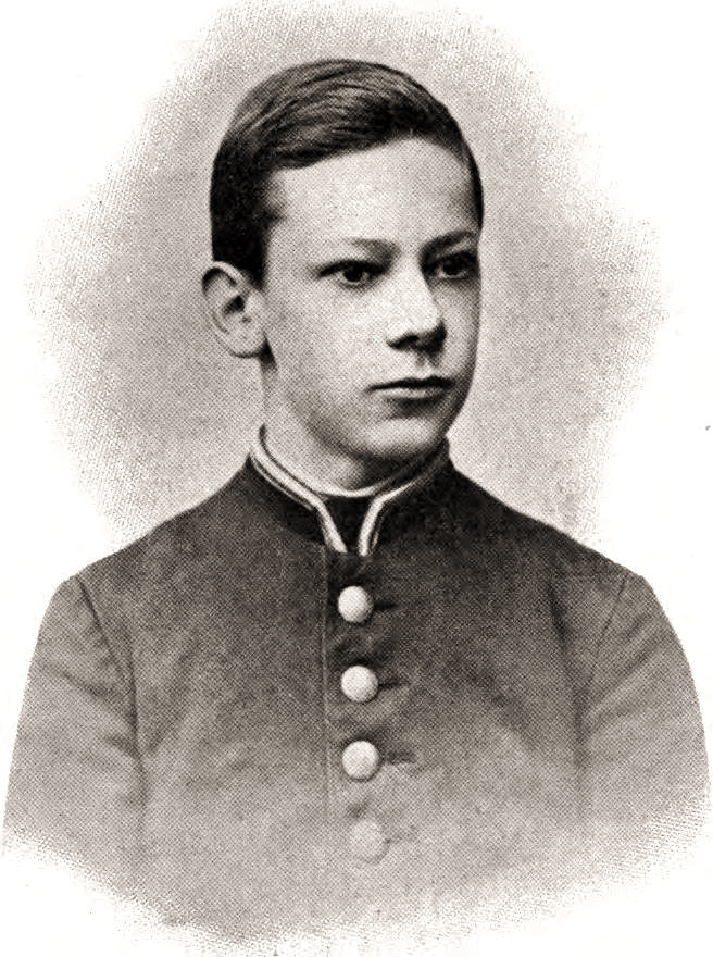 Ivan Platonovič Kaljaev